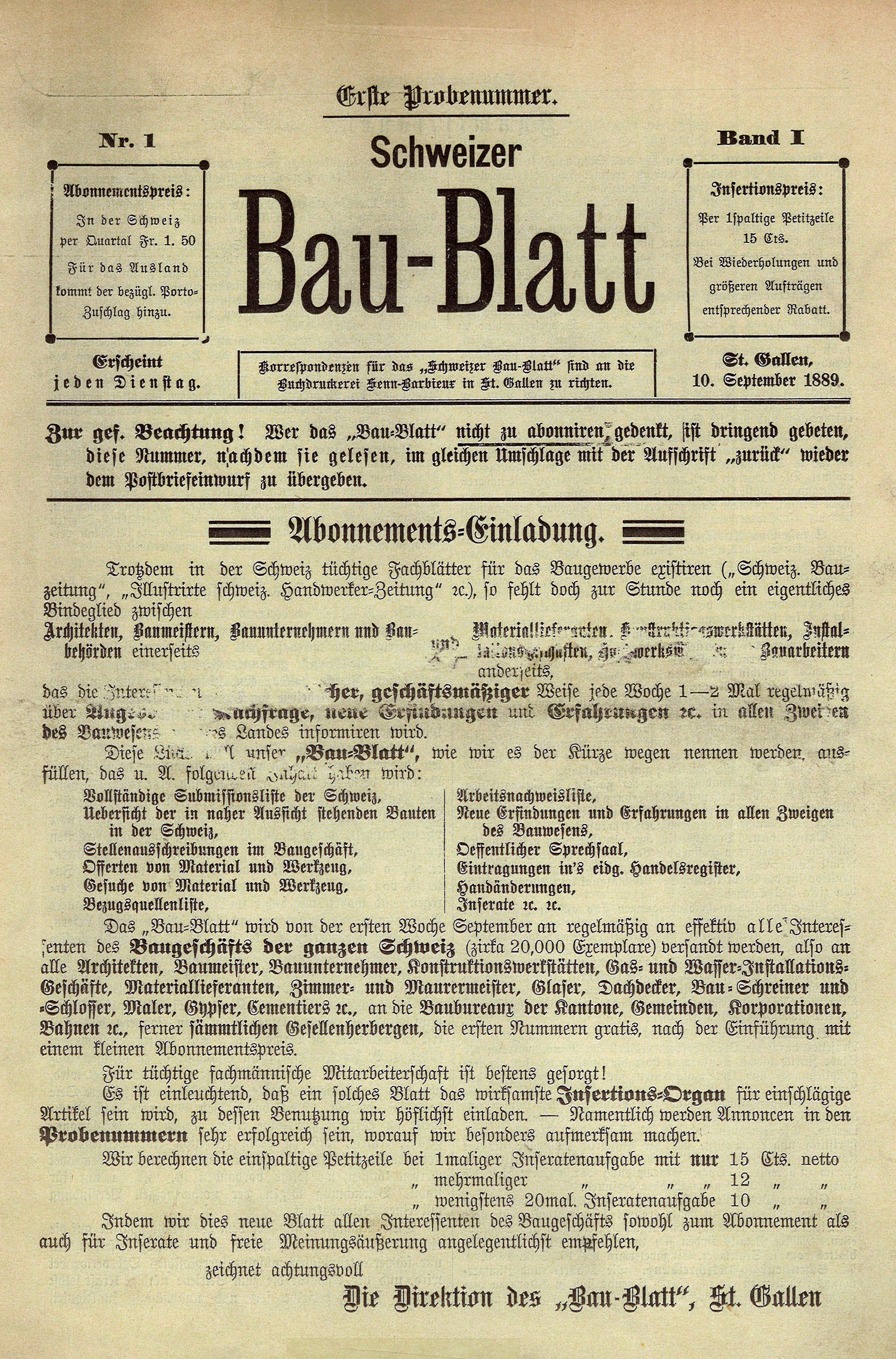 Frontseite der Erstausgabe des Schweizer Bau-Blatts (heute Baublatt)